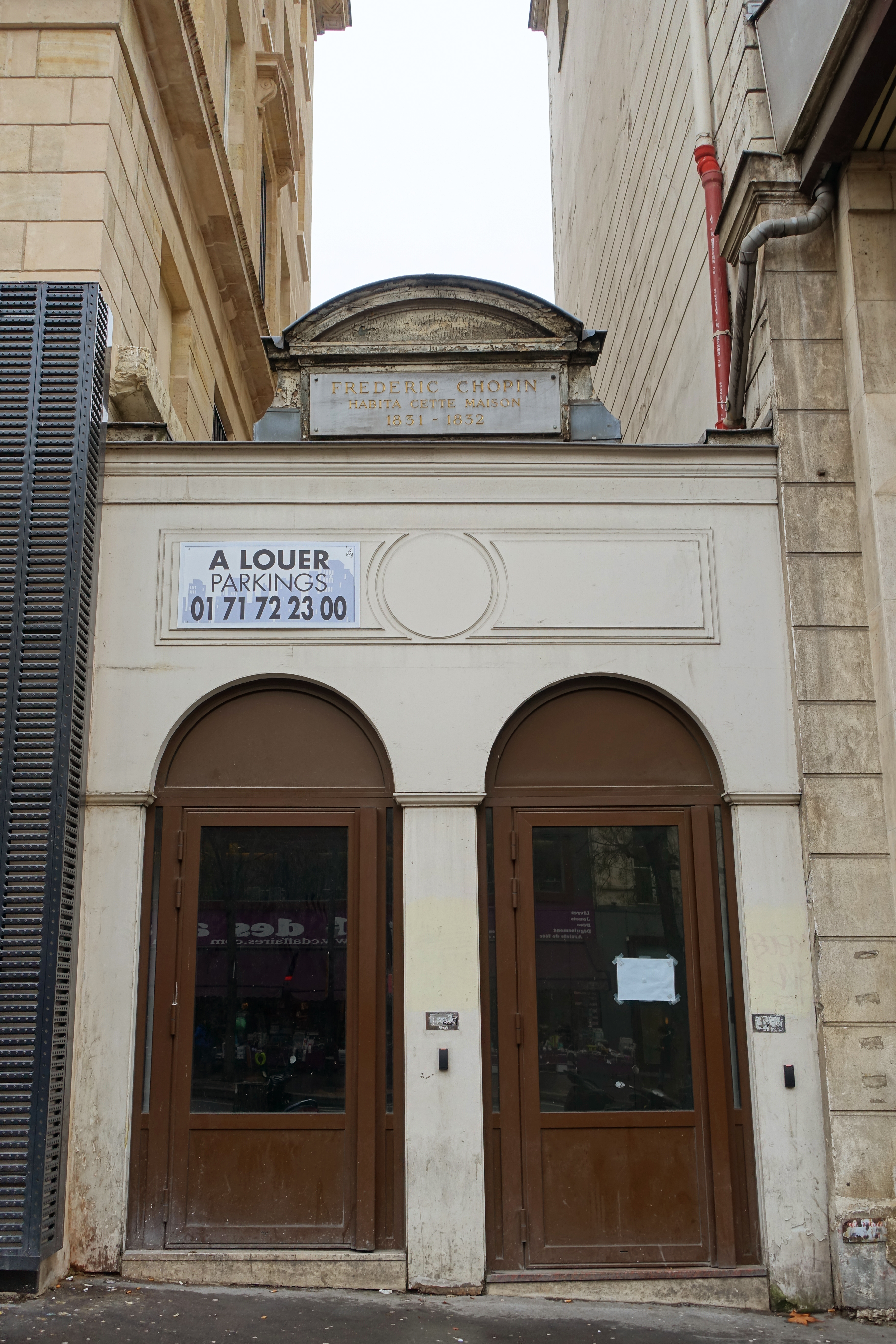 House of Chopin, Boulevard Poissonnière, Paris.